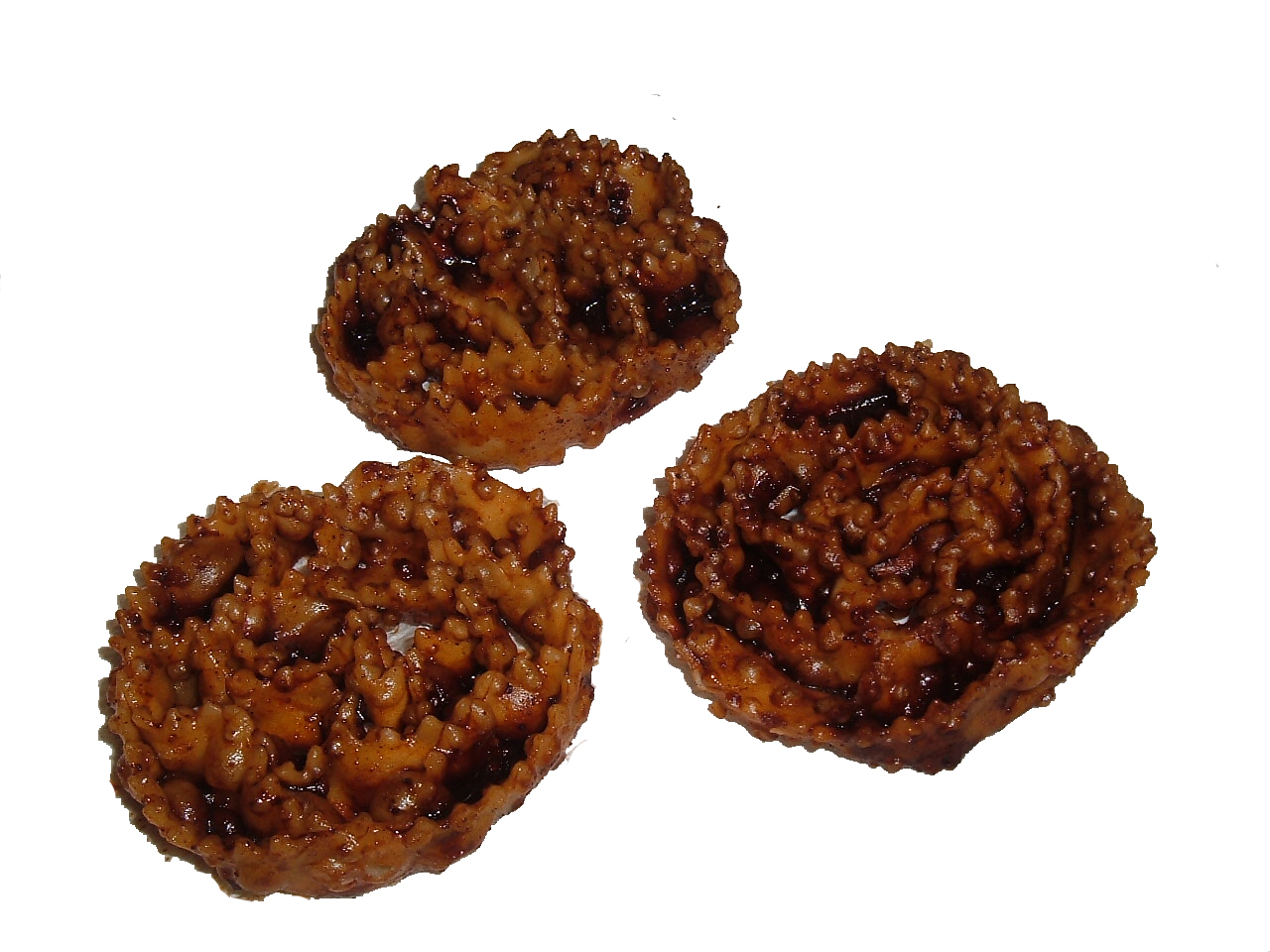 piatto tipico